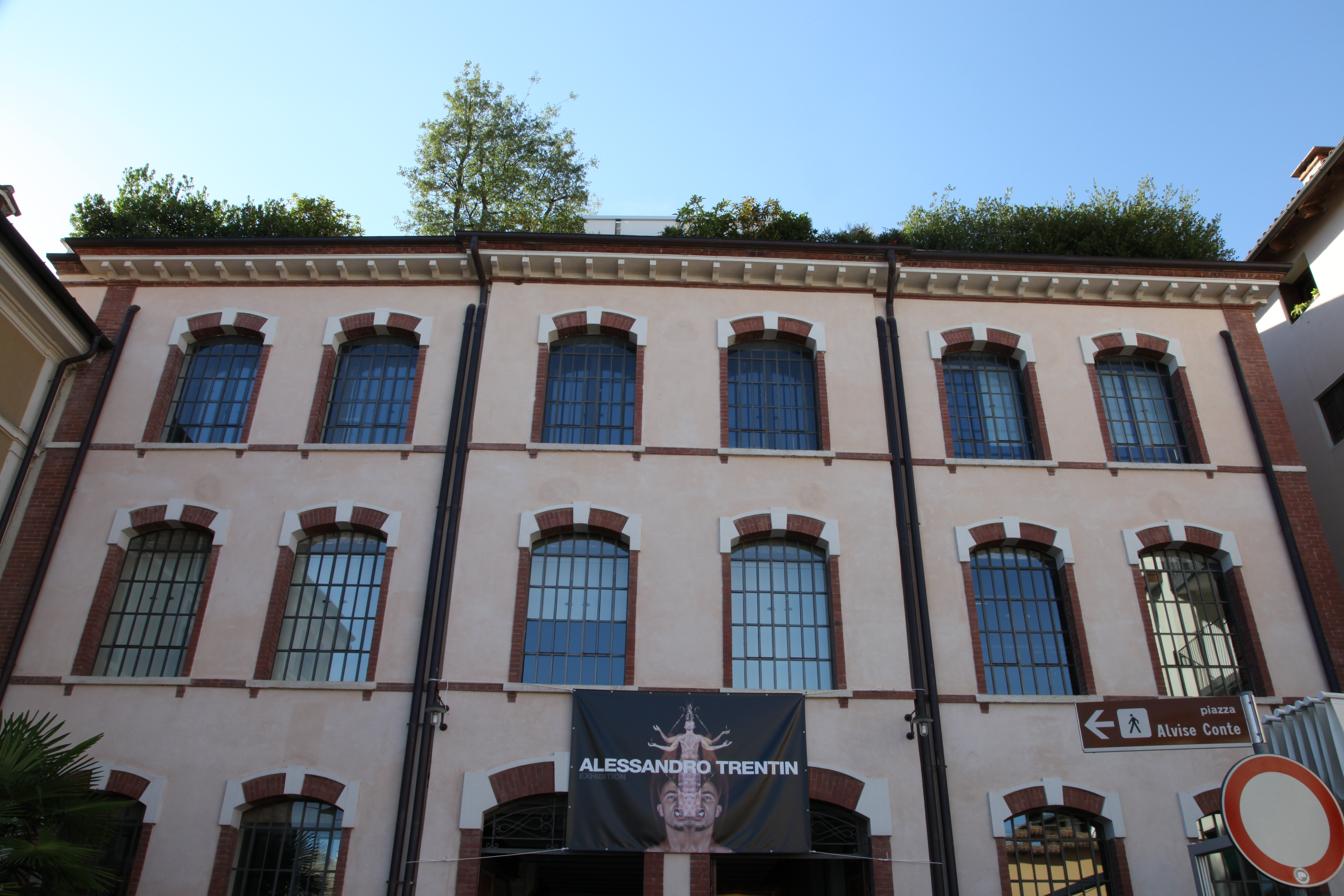 Facciata Lanificio Conte, primo piano e area "Shed" This is a photo of a monument which is part of cultural heritage of Italy.